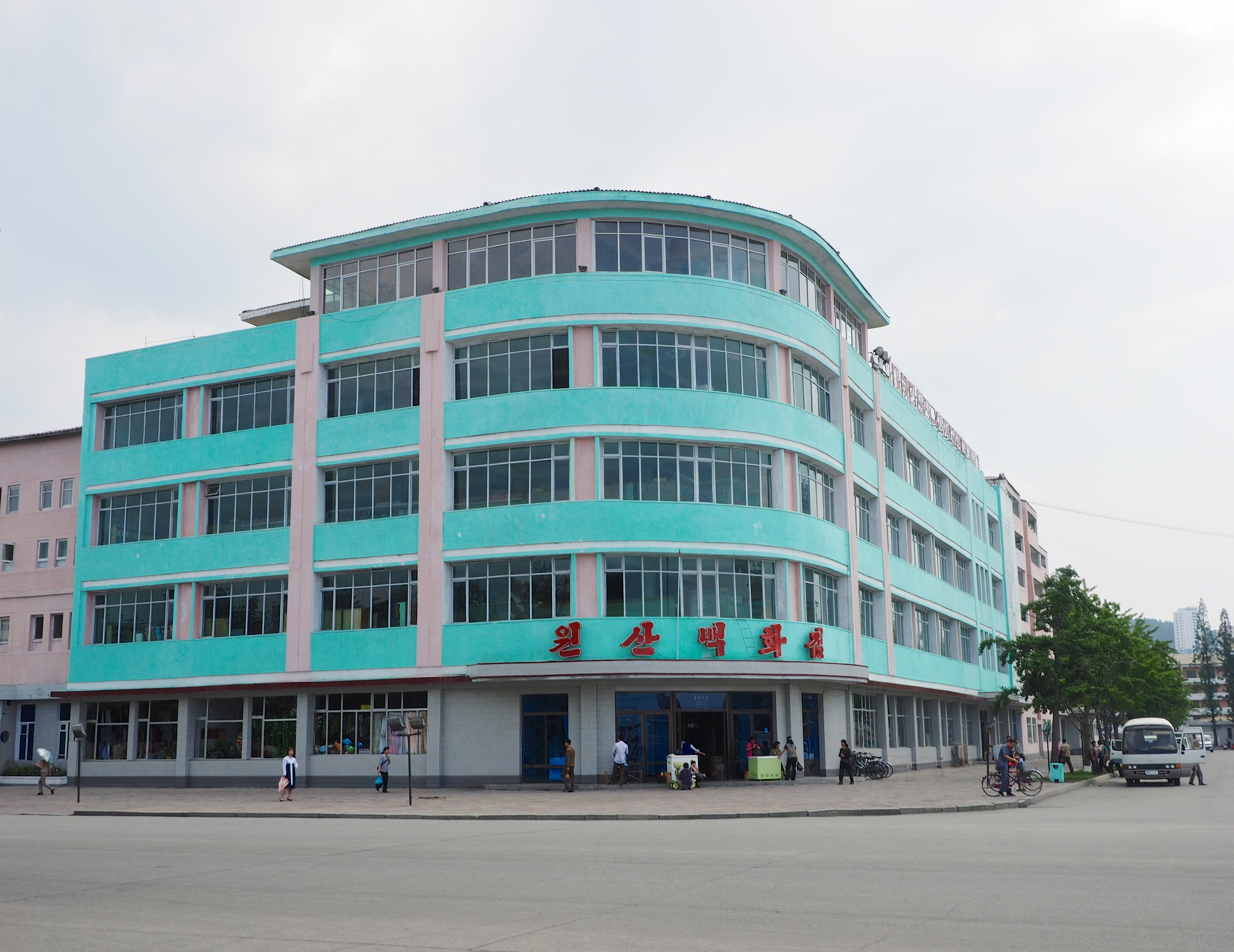 Department Store Wonsan DPRK